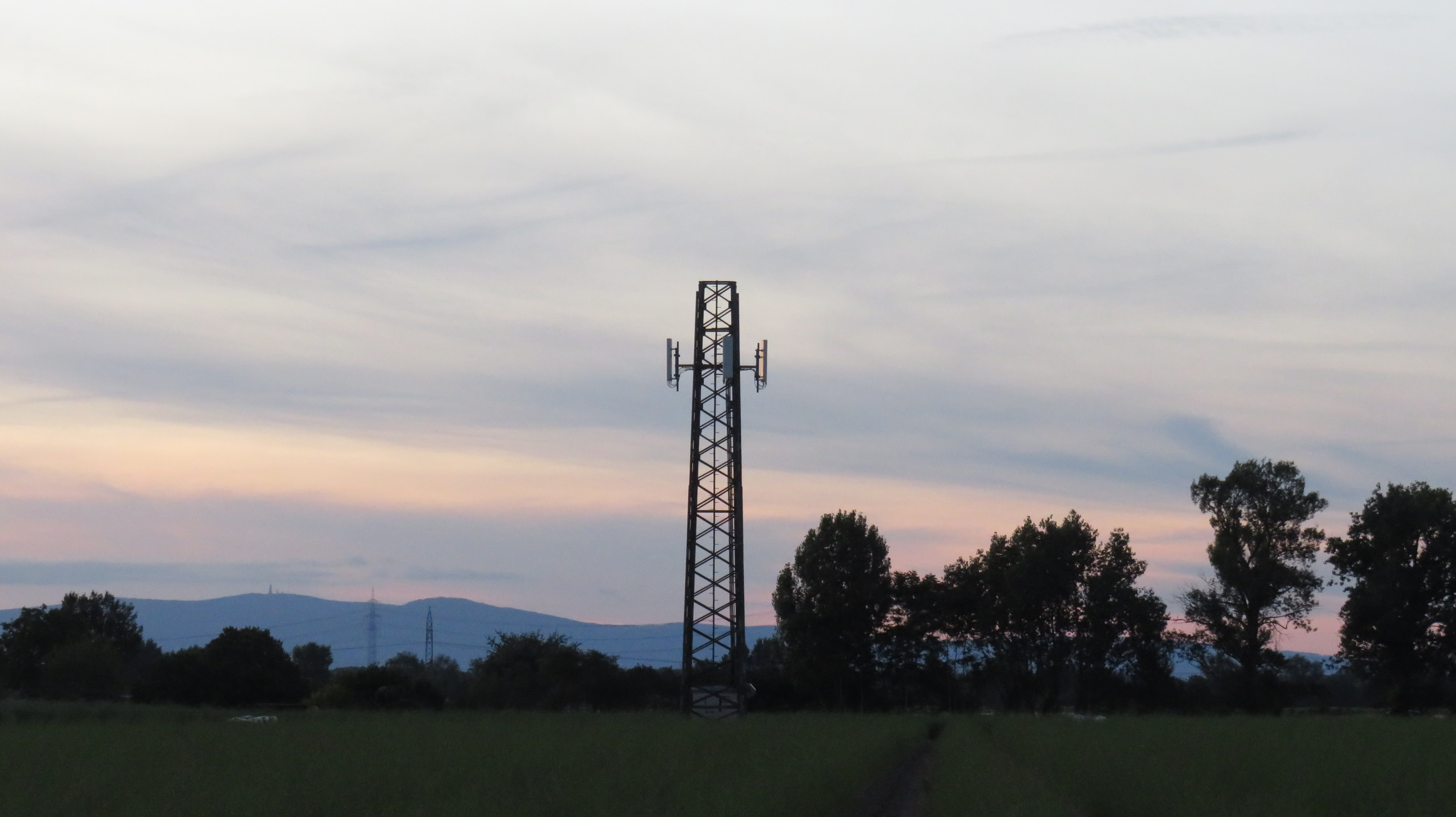 Sendemast bei Weiterstadt. Er gehörte ursprünglich als Freileitungsmast zur 220-kV-Verbindung zwischen dem alten Umspannwerk Kelsterbach und dem Umspannwerk Pfungstadt. Diese Leitung war Teil der ältesten deutschen Verbundleitung und wurde in den Jahren 2007 bis 2008 demontiert.